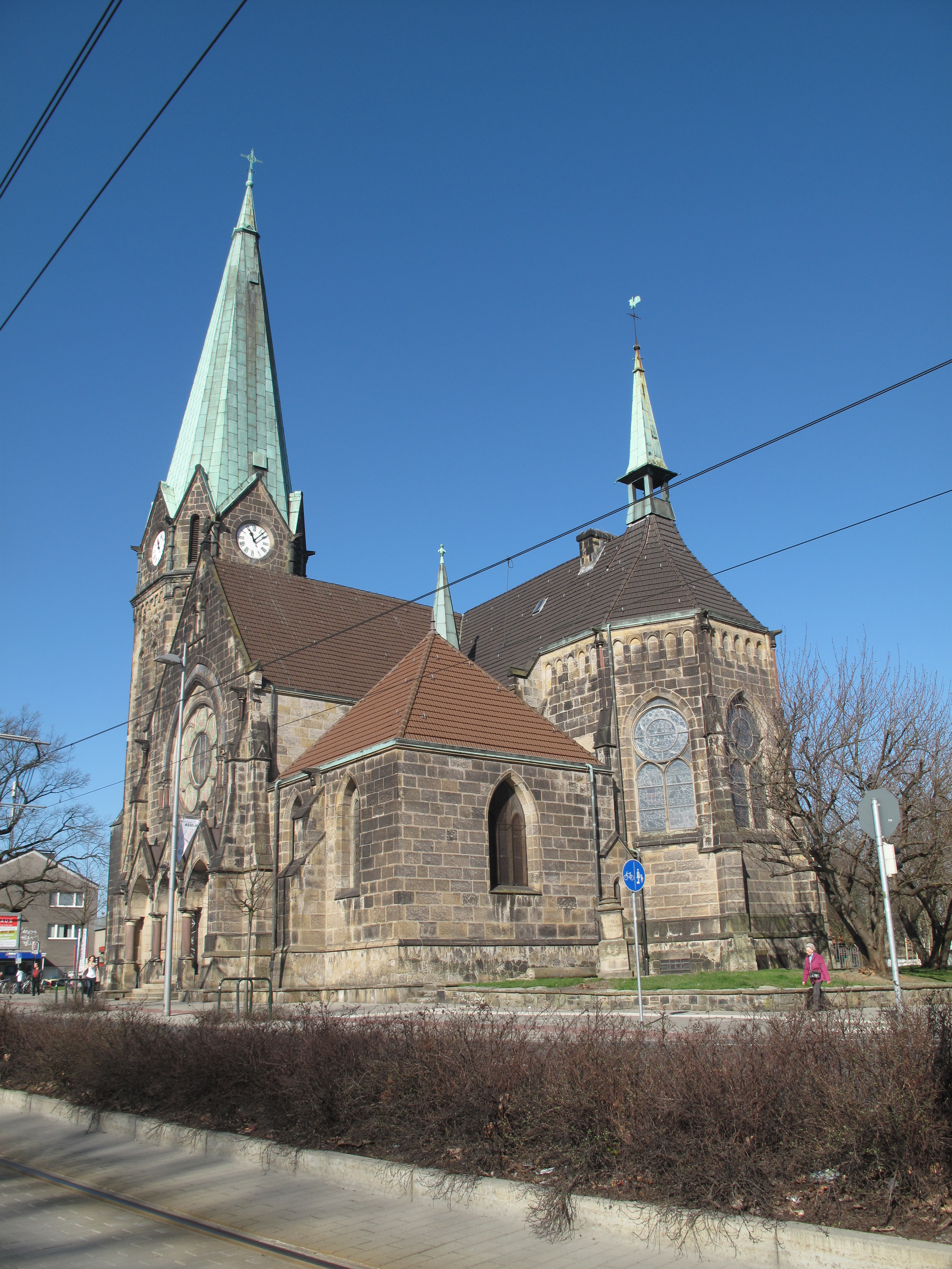 Dortmund-Asseln, kerk: die Lutherkirche